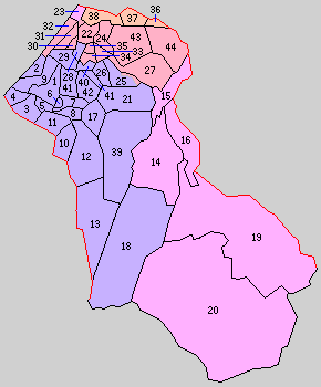 石川県能美郡の町村制施行時の町村。